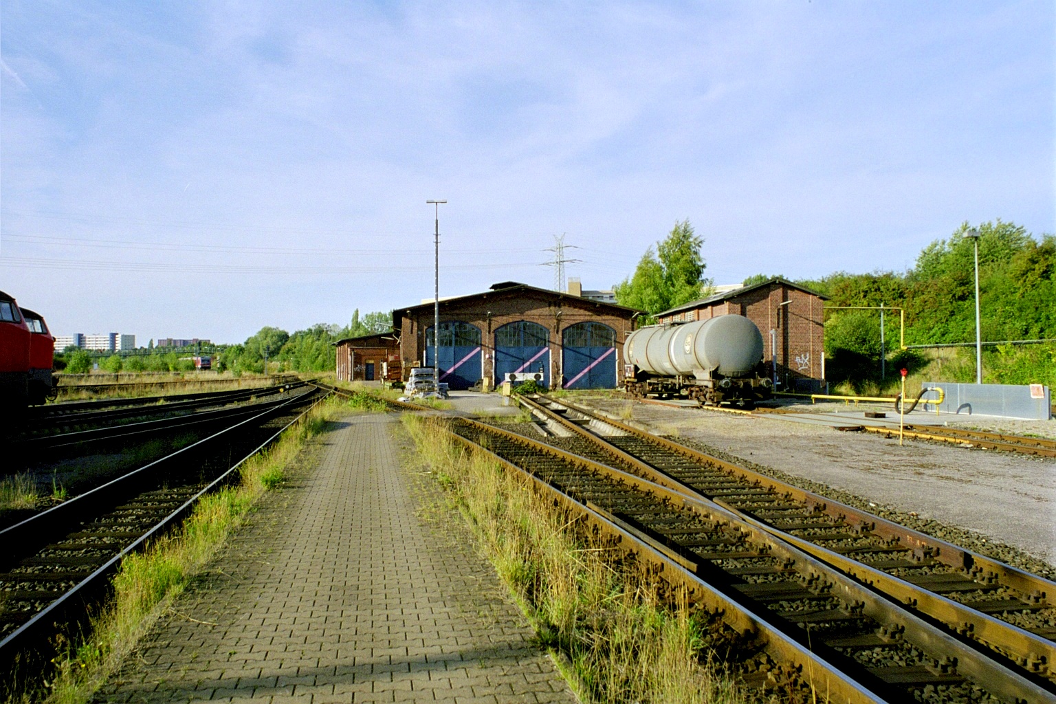 Der ehemalige Schuppen der Eutin-Lübecker-Eisenbahn im Bw Lübeck